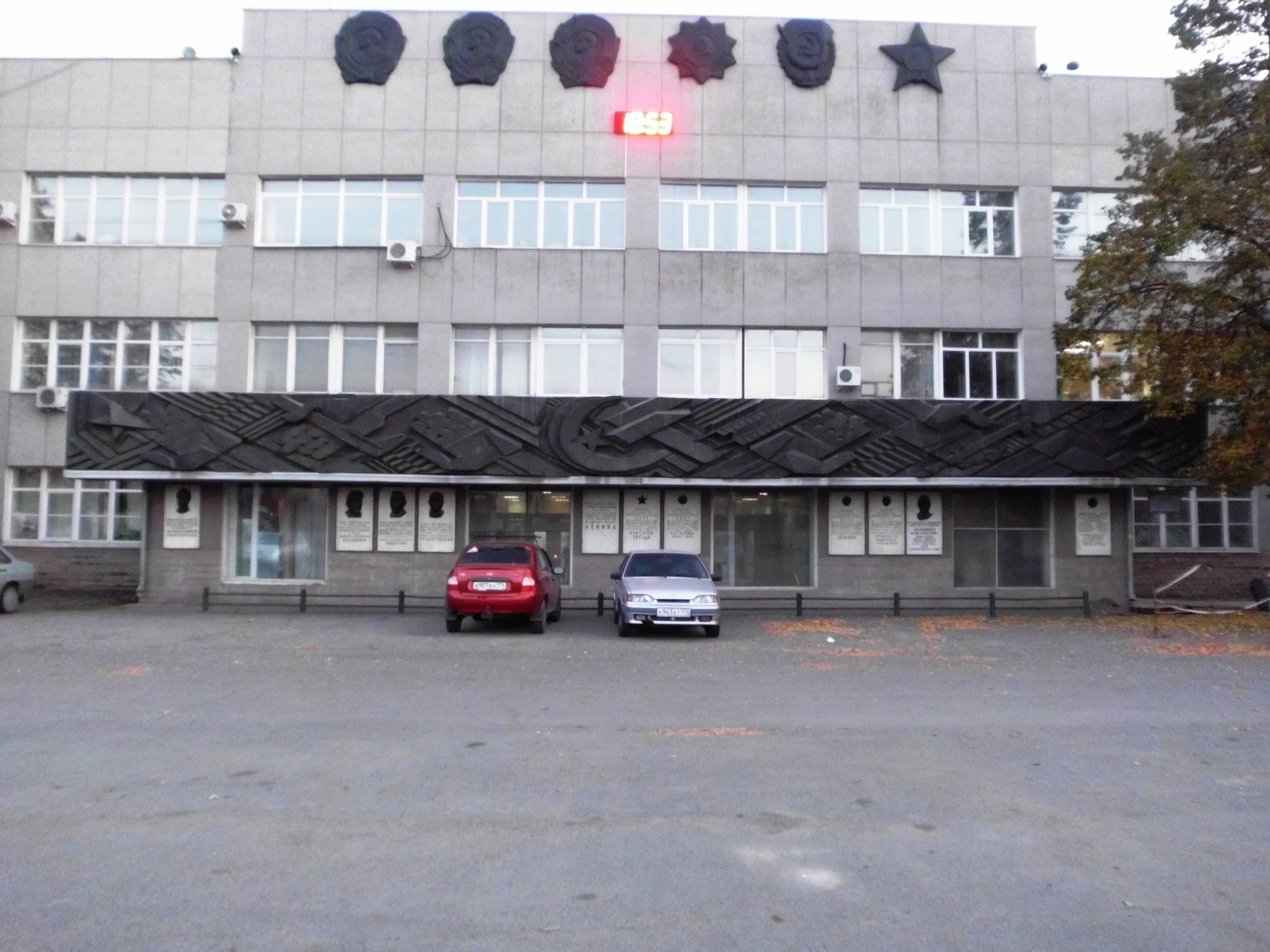 Здание заводоуправления ЧТЗ, которое посетили деятели государства и работали видные ученые: проспект Ленина, 3, Челябинск, Челябинская область. Центральная часть здания, главная проходная.